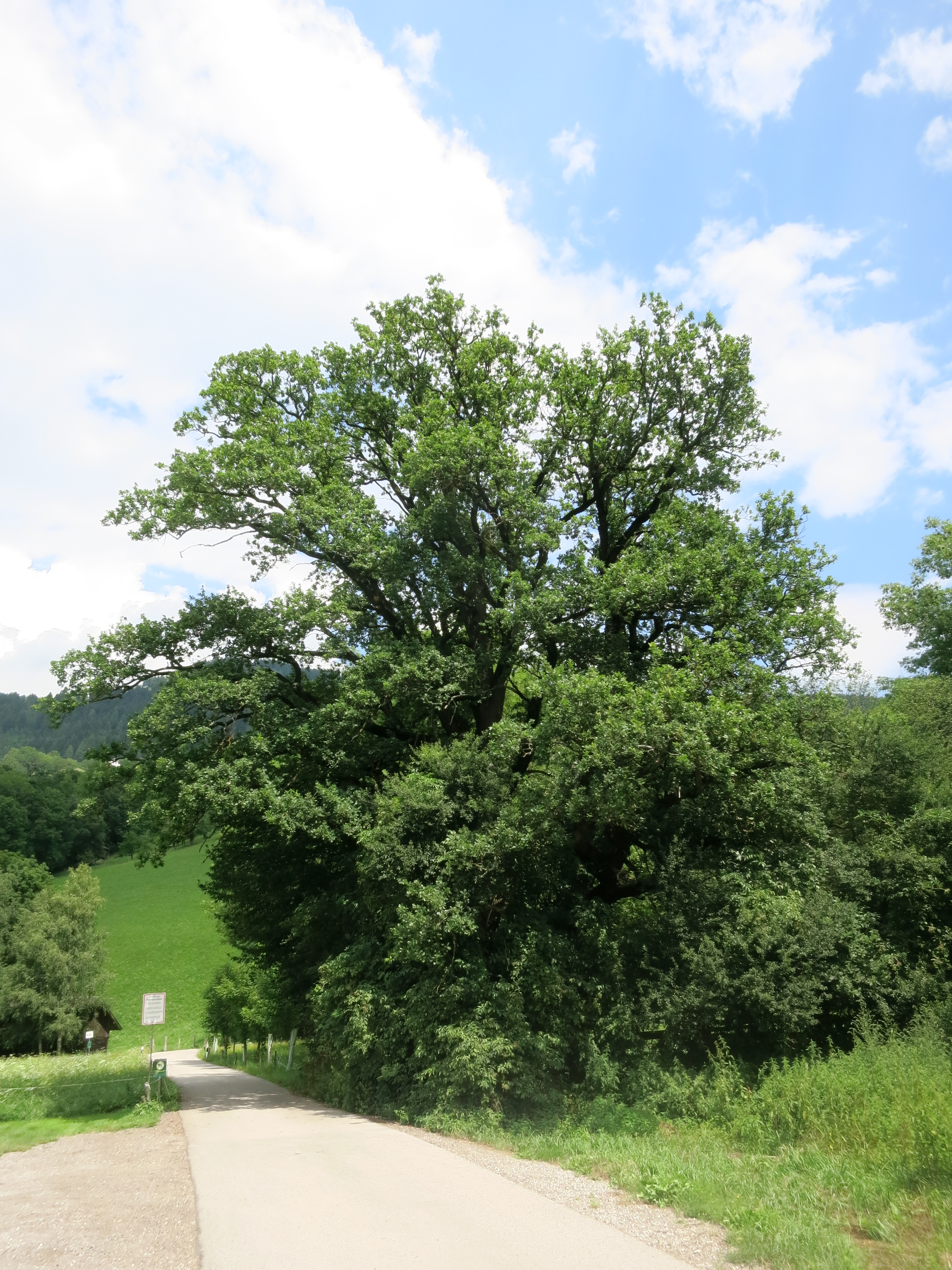 Eiche in Untergaimberg This media shows the natural monument in the Tyrol with the ID ND_7_10.